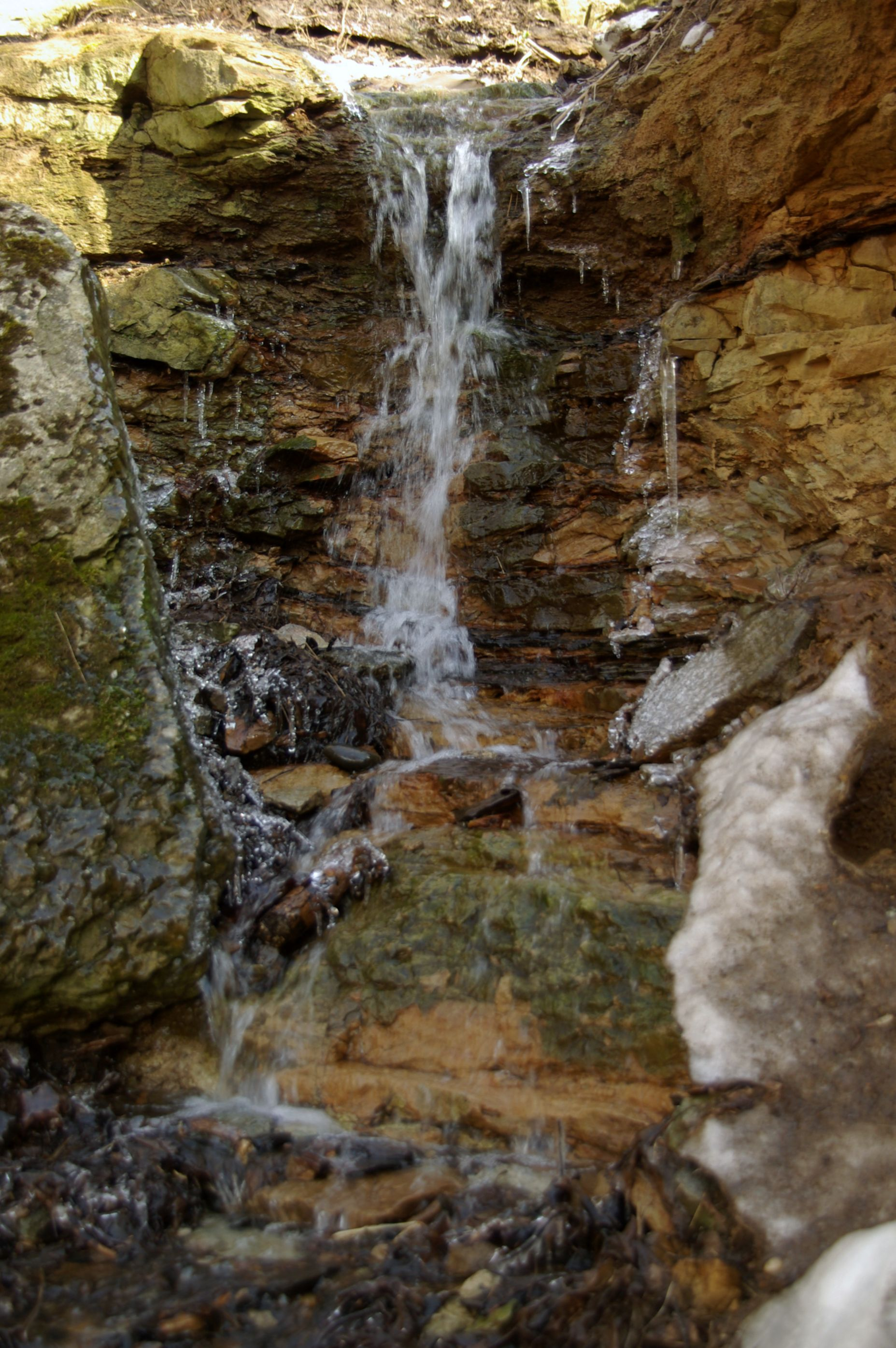 Asub Tallinna linnas, Kadrioru pargi territooriumil, Hundikuristiku kanjonis